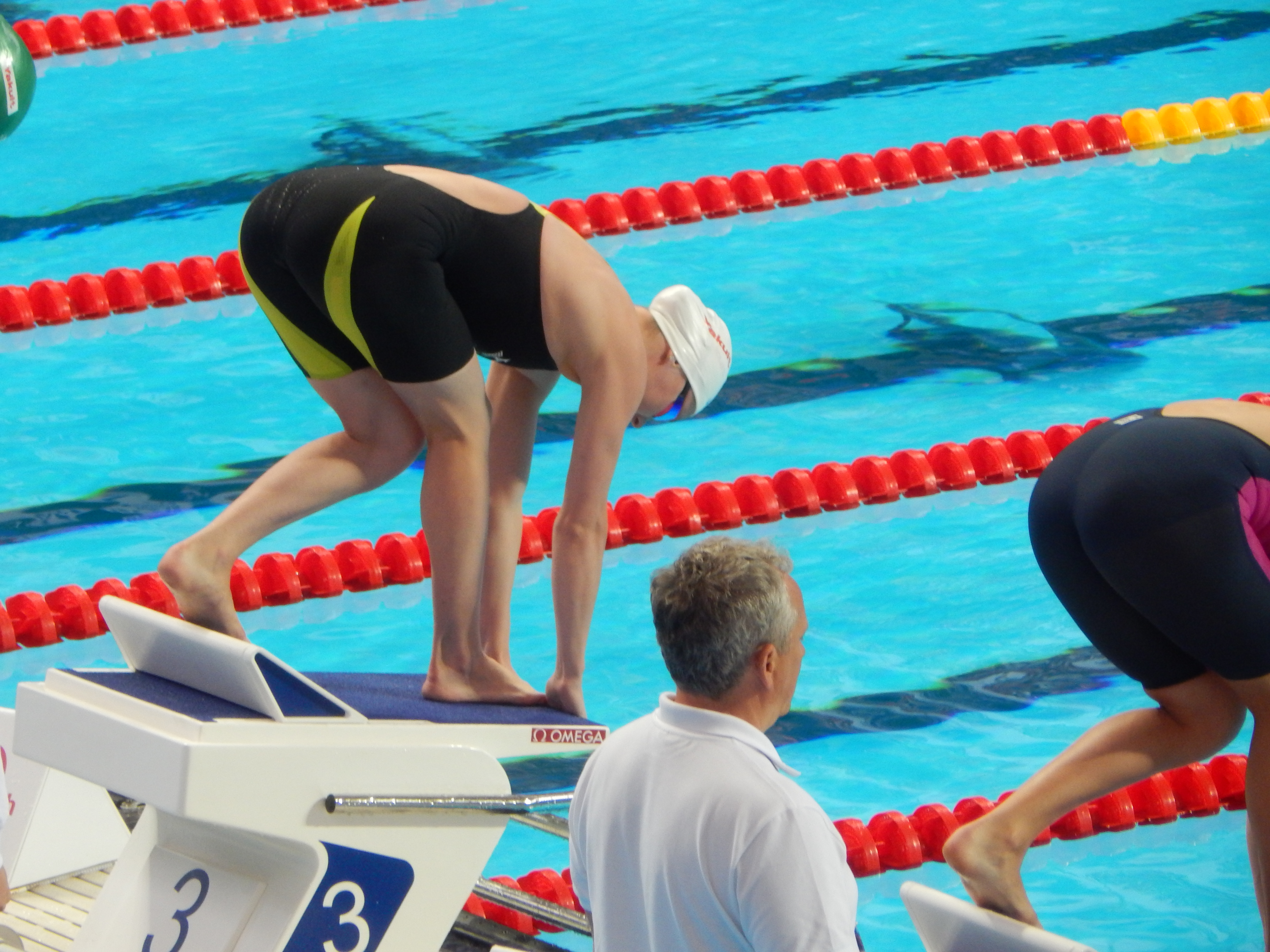 Мария Ливер в Казани 2015